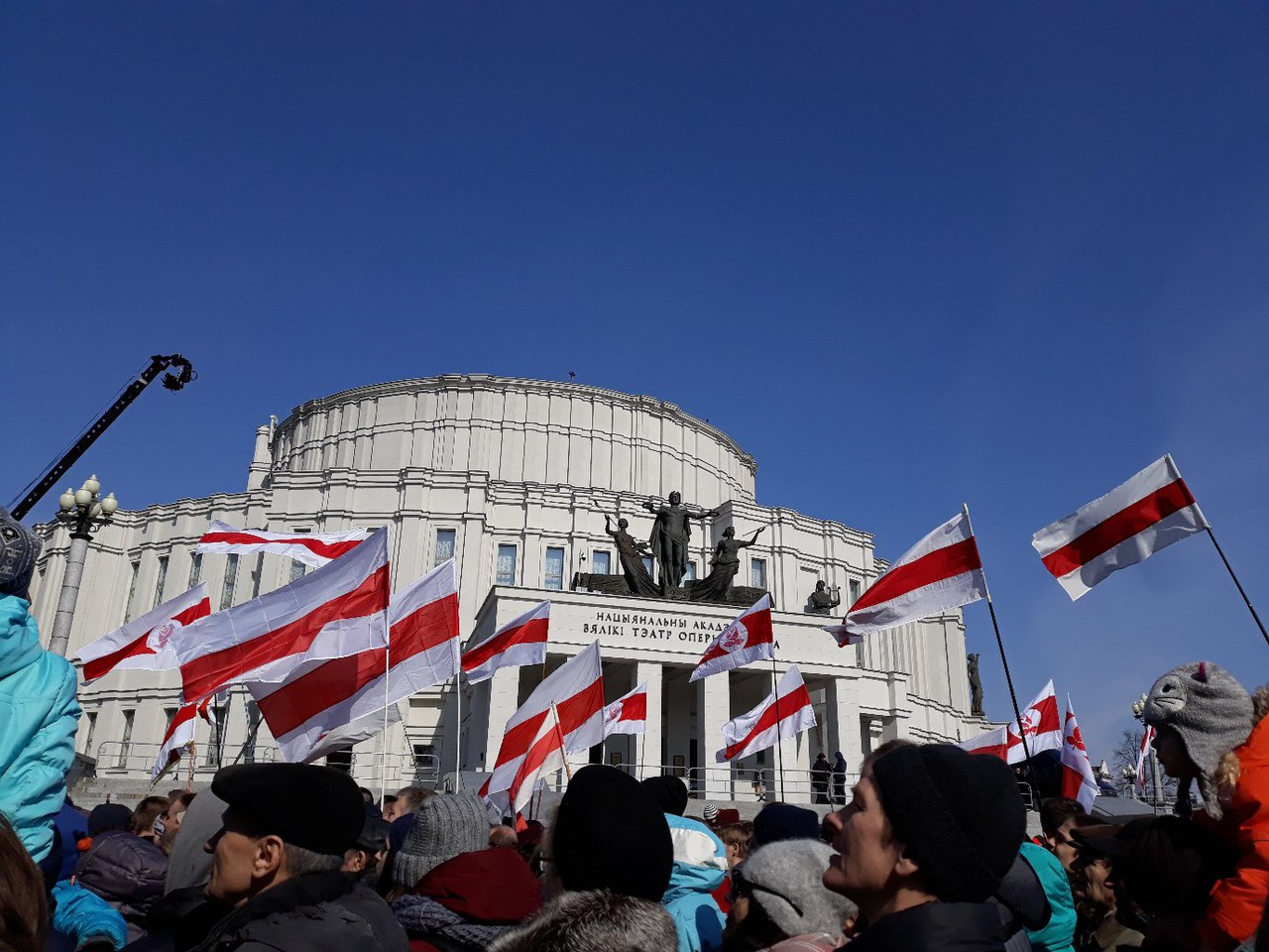 Святочны канцэрт прысвечаны 100 годдзю БНР у Мінску